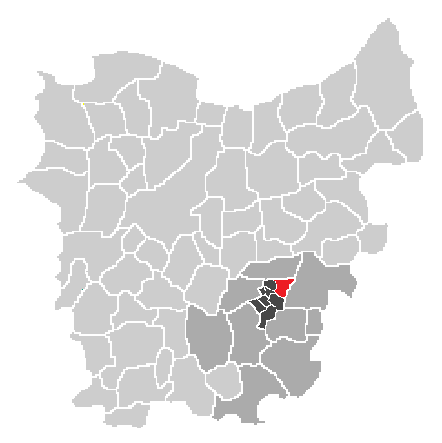 Oost-Vlaanderen uitgeknipt en bewerkt